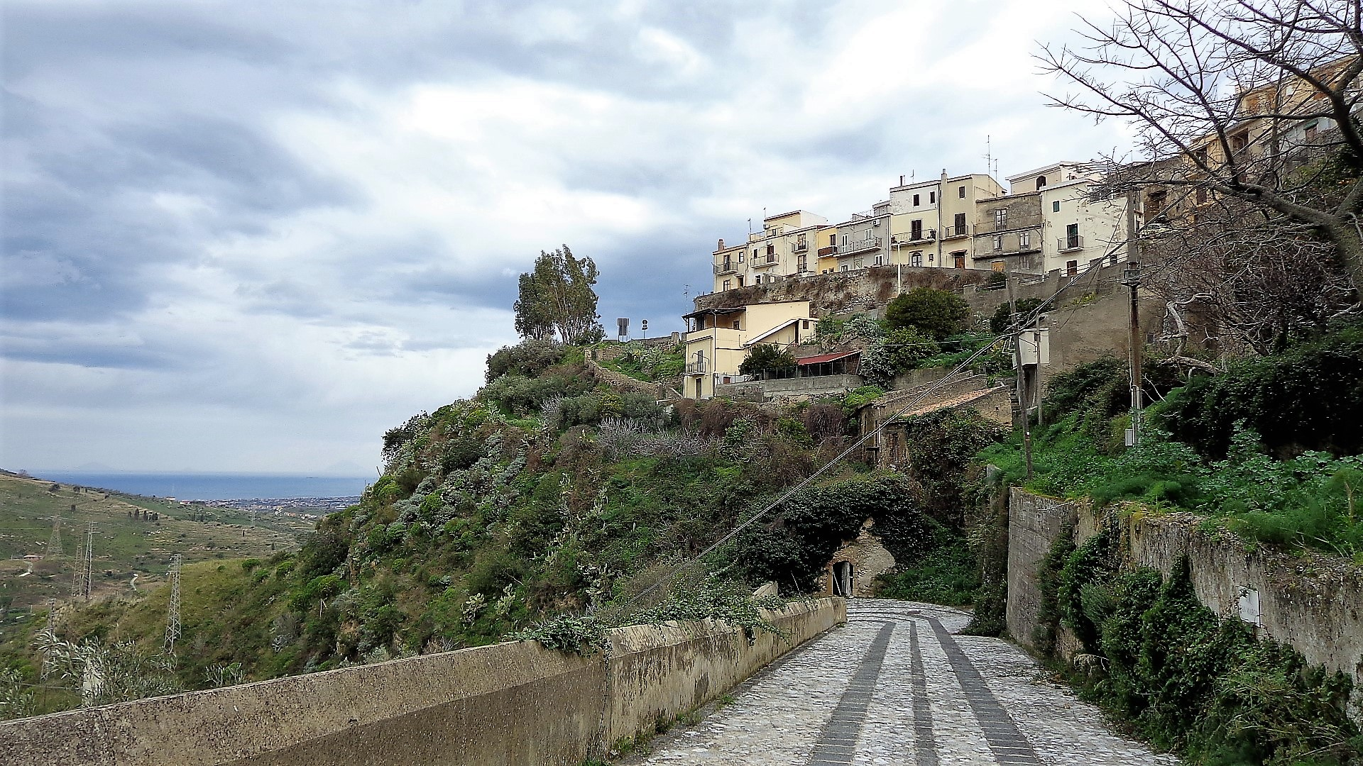 Le Mura e la salita a Porta Ranieri